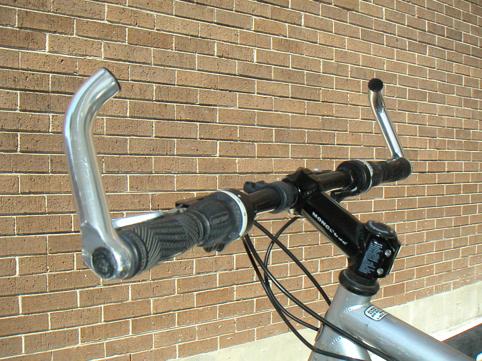 Mountain bike's bar ends